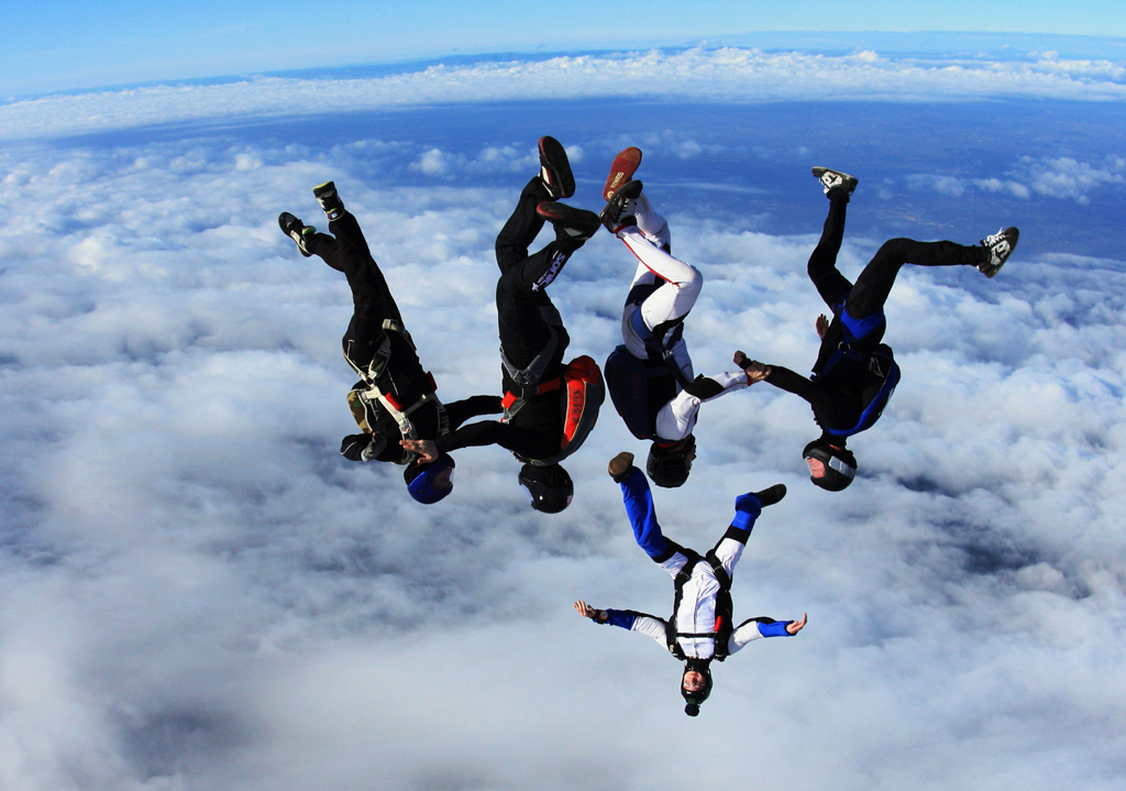 Equipe française de VRV